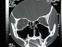 source : public